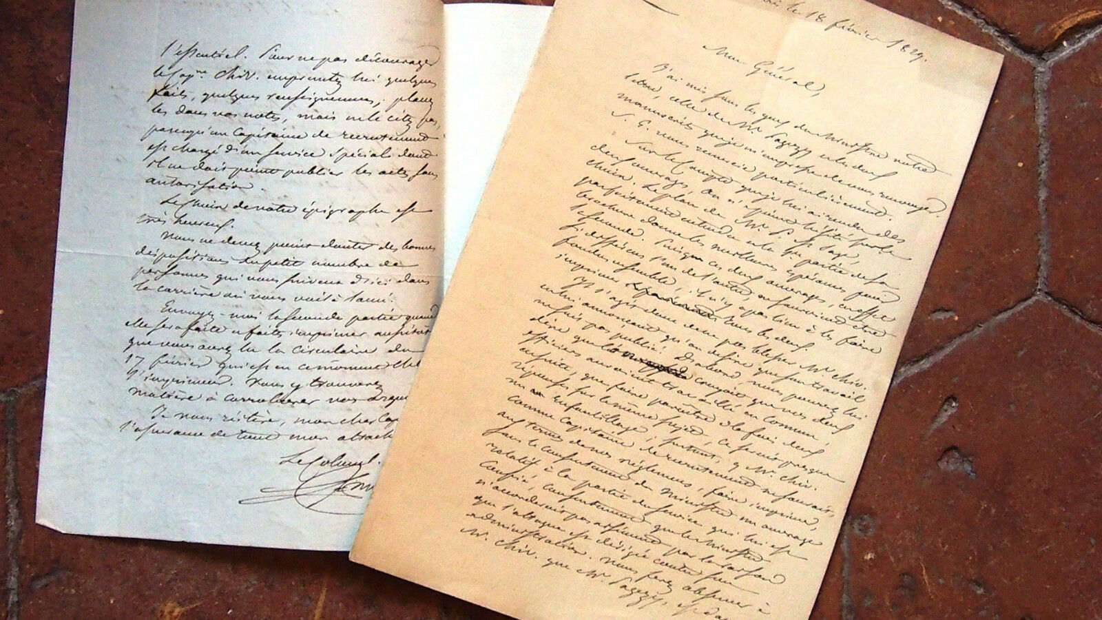 Lot de 2 longues lettres de 3 et 2 pages par le colonel MIOT frere de l'embassadeur Miot DE MELITO homme de confiance de Joseph bonaparte la premiere est adressée au capitaine PAGEZY pour lui assurer son aide pour faire adopter son ouvrage par l'état major et le mettre à l’abri de la mauvaise jalousie de certain officiers la seconde lettre est adressée au ministre de la guerre , elle concerne toujours le travail du capitaine Pagezy et à son parfait travail pour cet ouvrage indispensable pour l'armée et s'en explique longuement